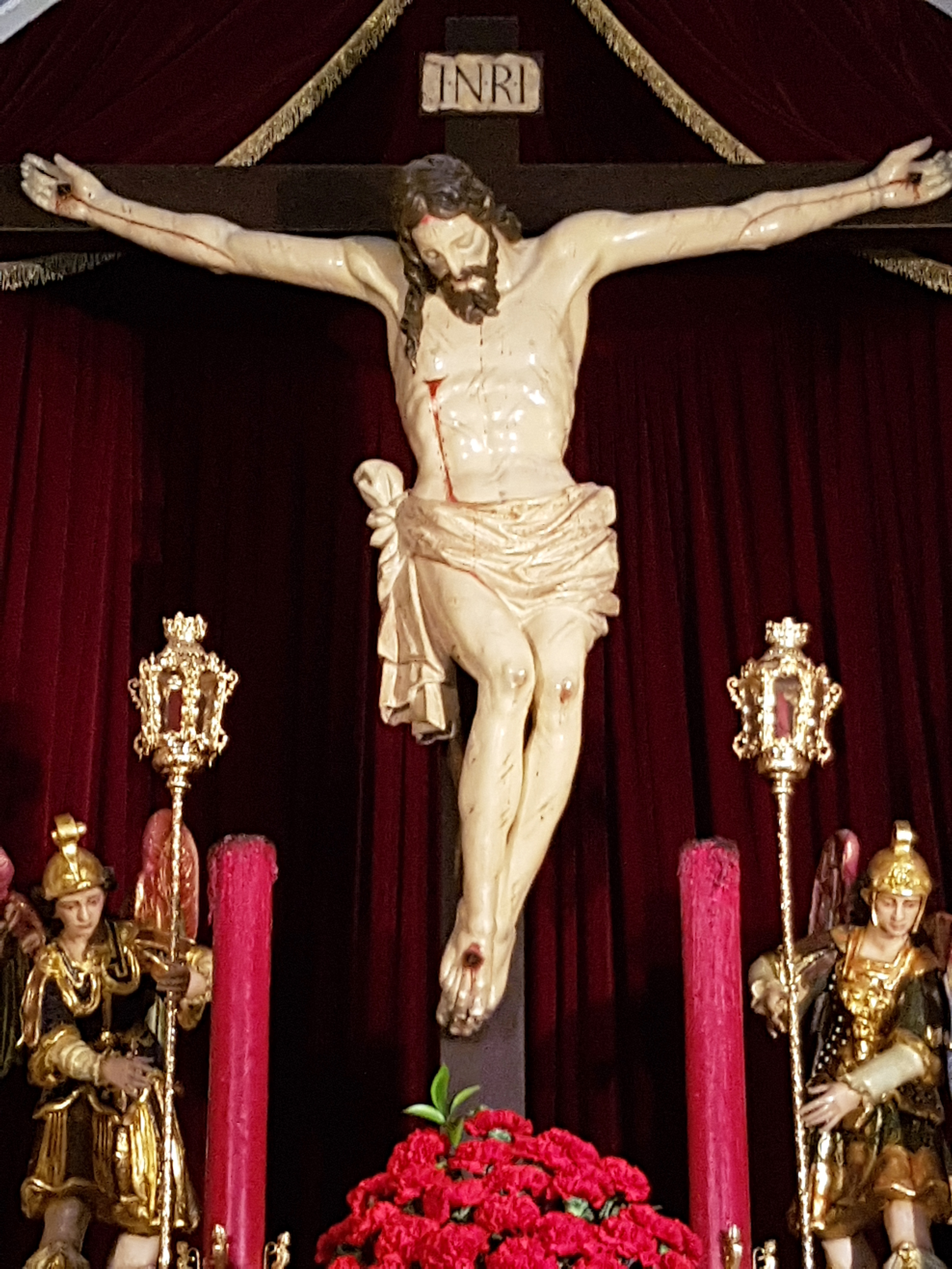 El Cristo de la Ánimas de Ciego en la iglesia de San Juan Bautista de Málaga, obra del escultor Pedro de Zayas.